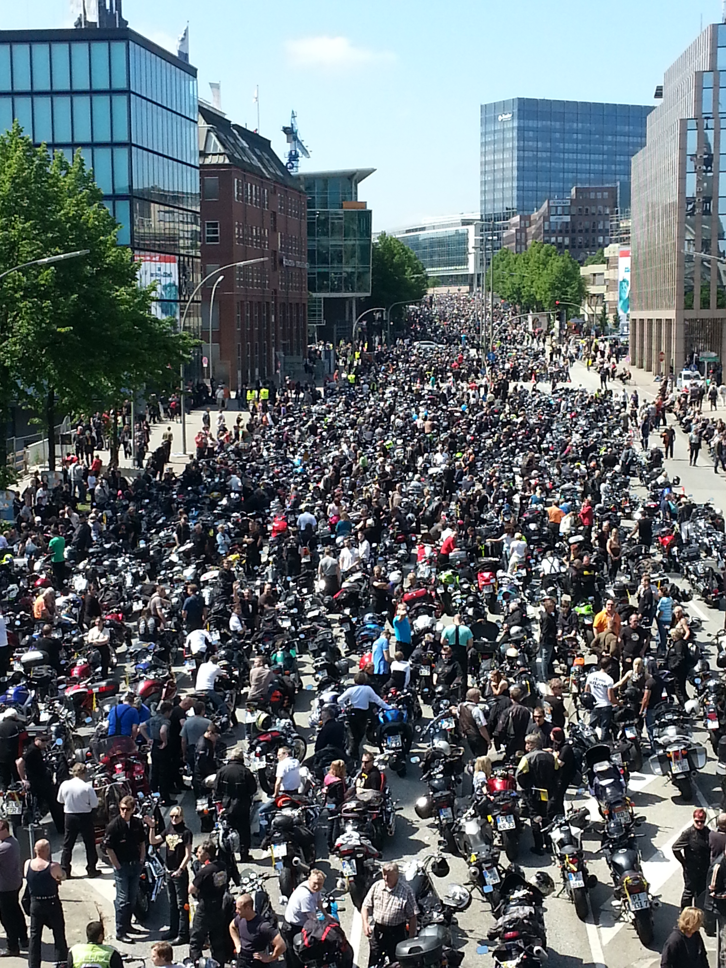 Motorradgottesdienst MOGO 2013 in Hamburg, Germany